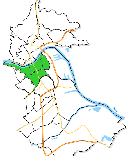 Städtische Bezirke Linz, Stadtteil Innenstadt hervorgehoben